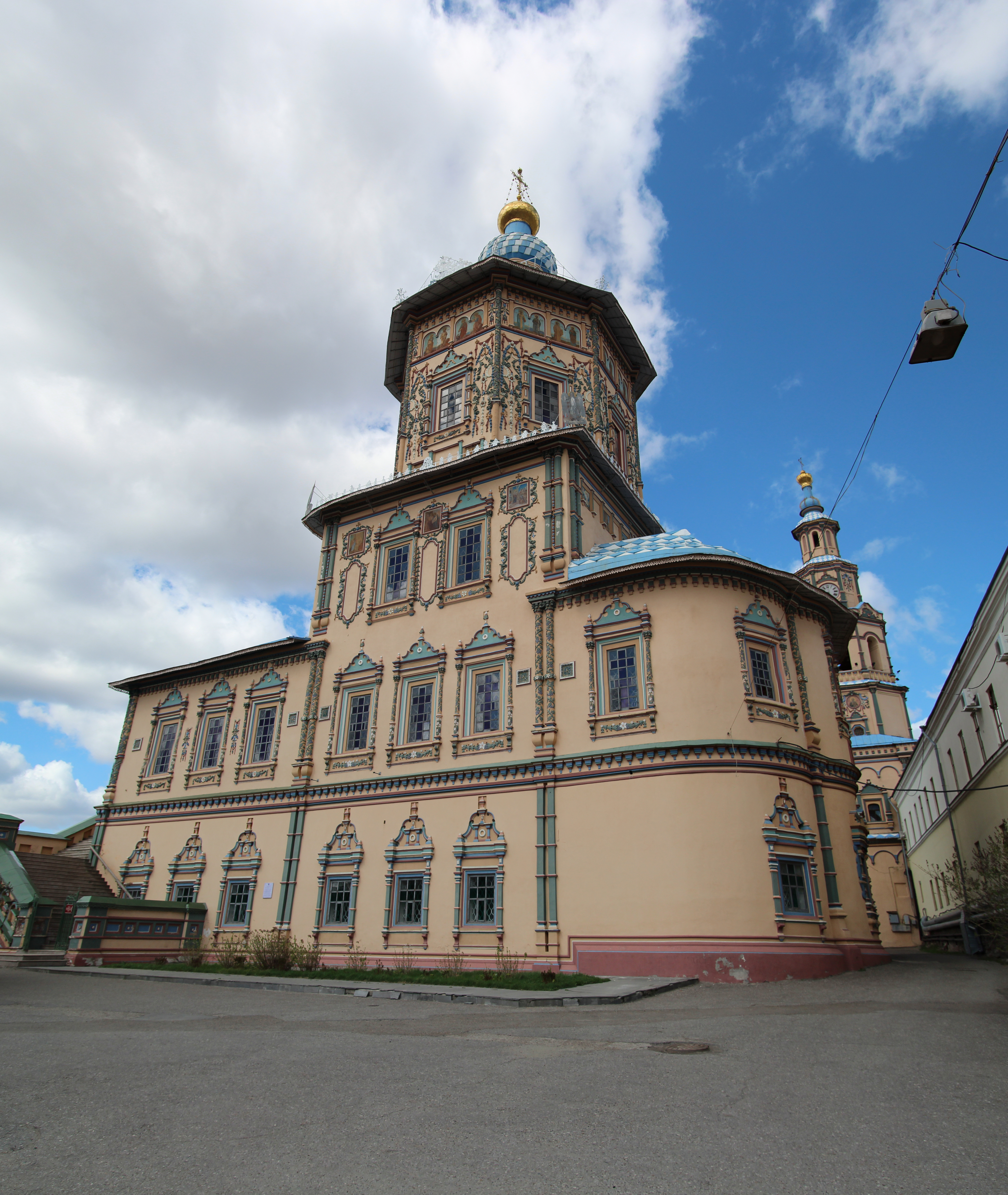 Собор: улица Джалиля, 21, Казань, Татарстан